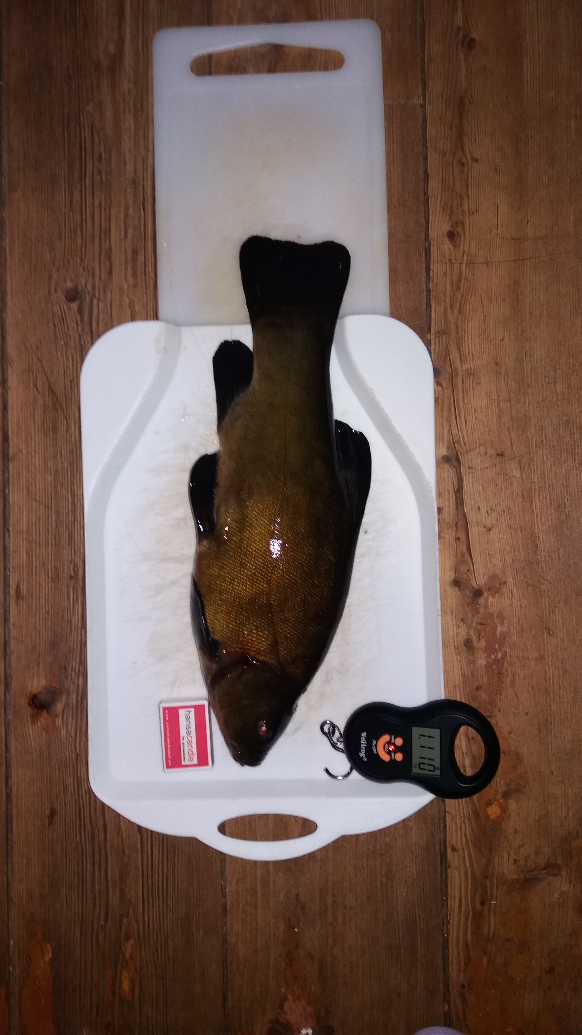 Linask 1 tund peale välja püüdmist.